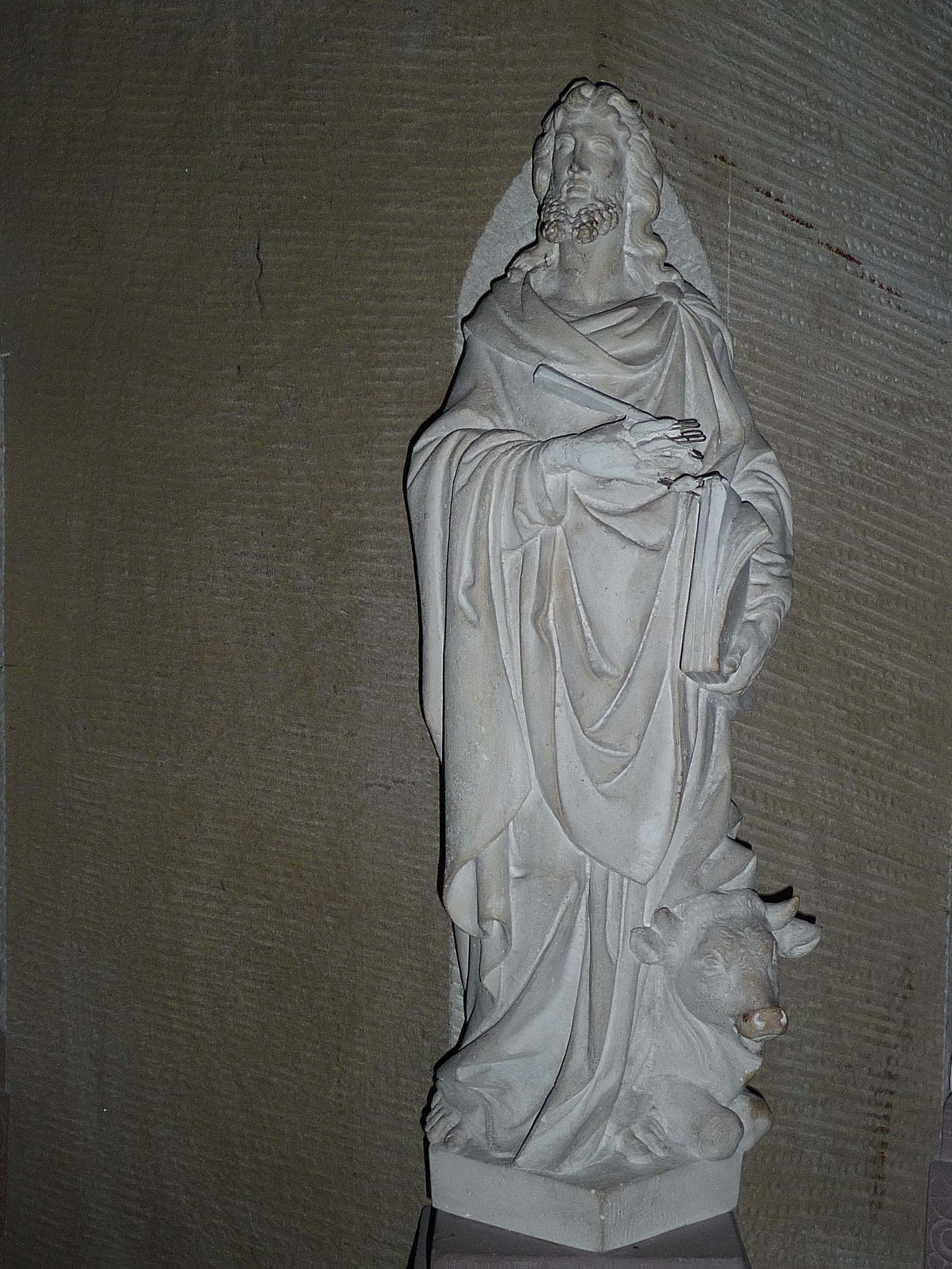 Darstellung des Evangelisten Lukas am Ambo in der Stiftskirche in Baden-Baden (Baden-Württemberg, Deutschland); 1866 von Werkmeister Belzer (Weißenbach) aus weißem Sandstein gehauen